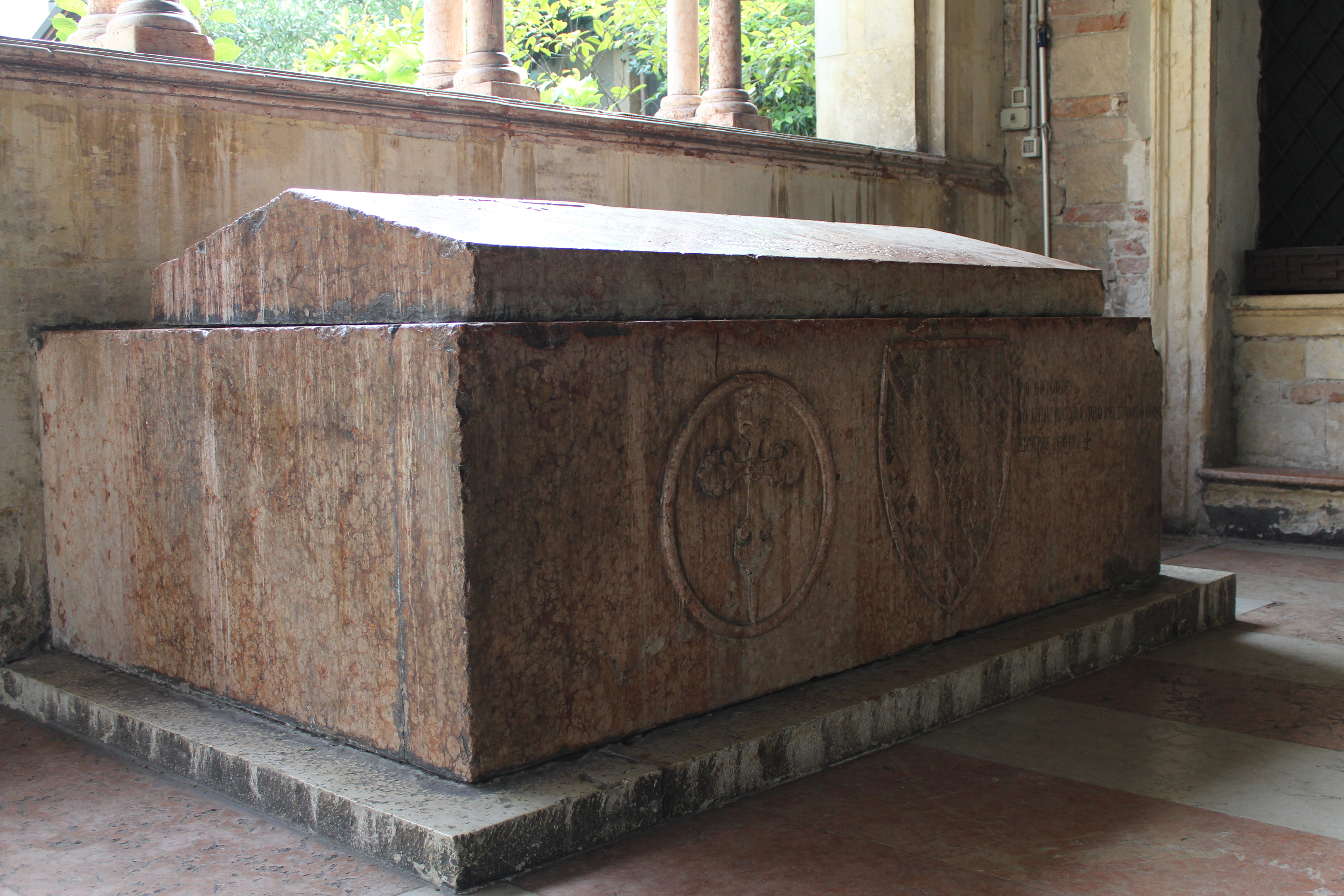 Chiesa della Santissima Trinità in Monte Oliveto a Verona. Sarcofago Antonia da Sesso